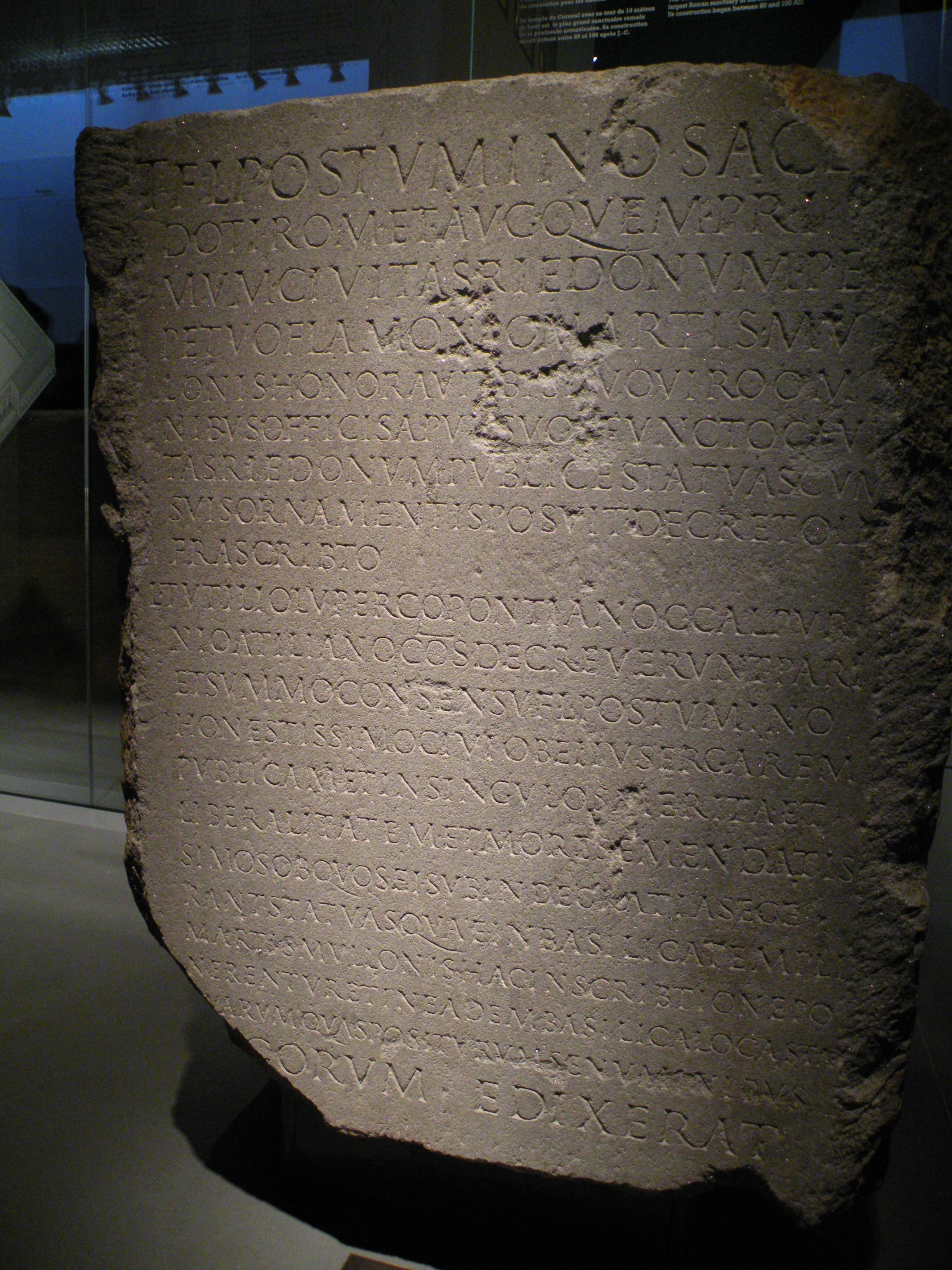 Stèle avec inscription évoquant Titus Flavius Postuminus, conservée au Musée de Bretagne.